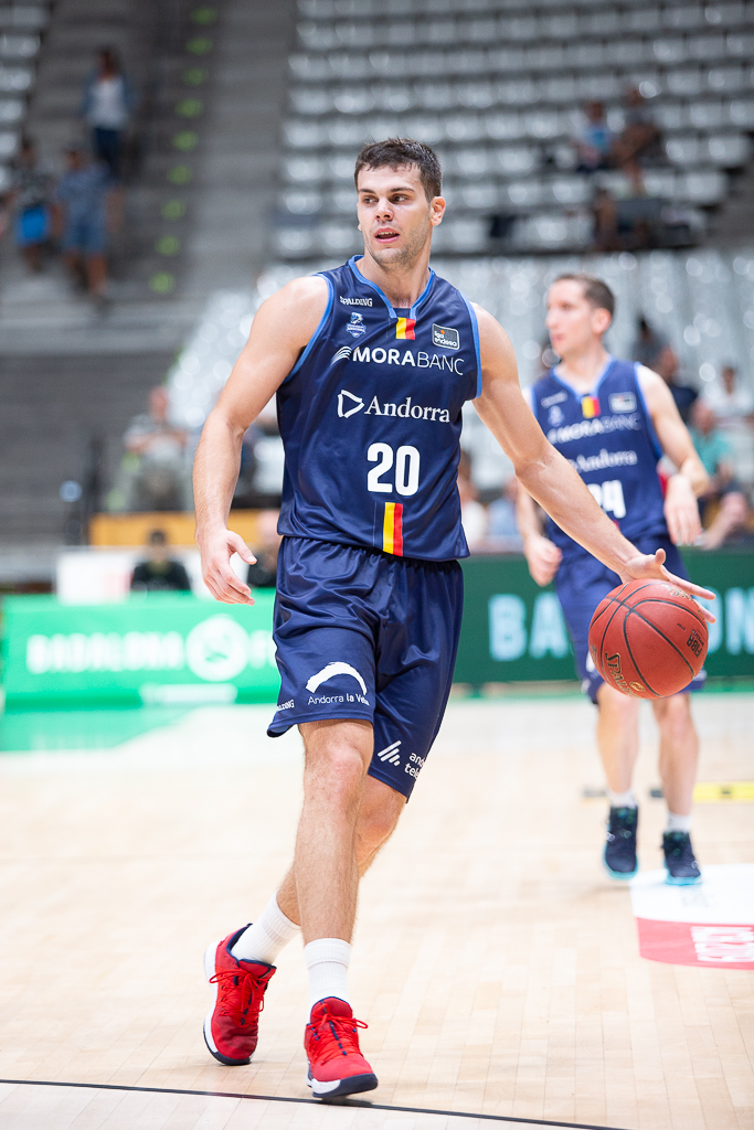 Dejan Todorovic en un partido de la Liga Catalana 2019 en el Olímpico de Badalona.